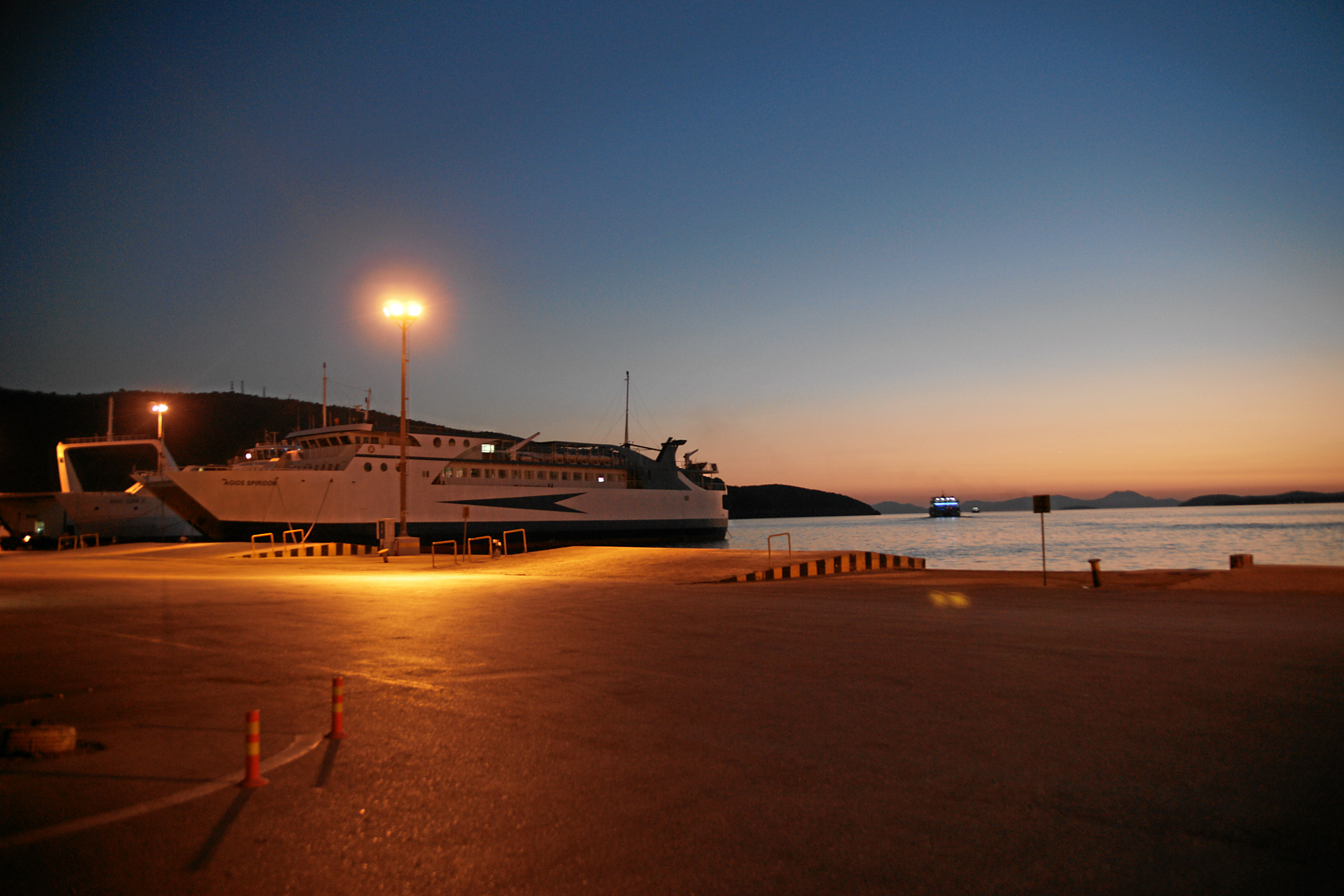 Hafen von Igoumenitsa